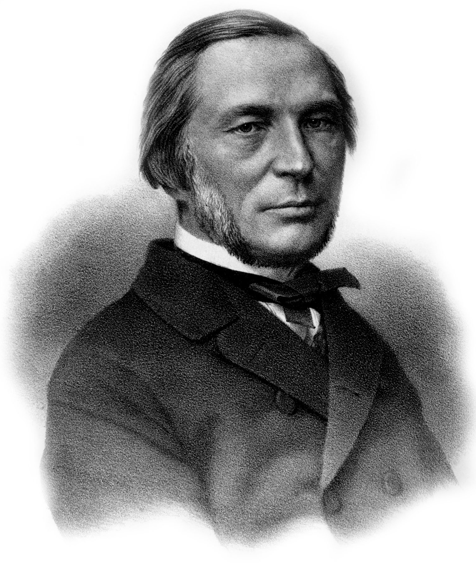 P. TCHEBICHEF. Съ Фотогр. Деньера. Лит. А. Мюнстера, СПБ. Imp. Lith. A. Munster (Editeur)